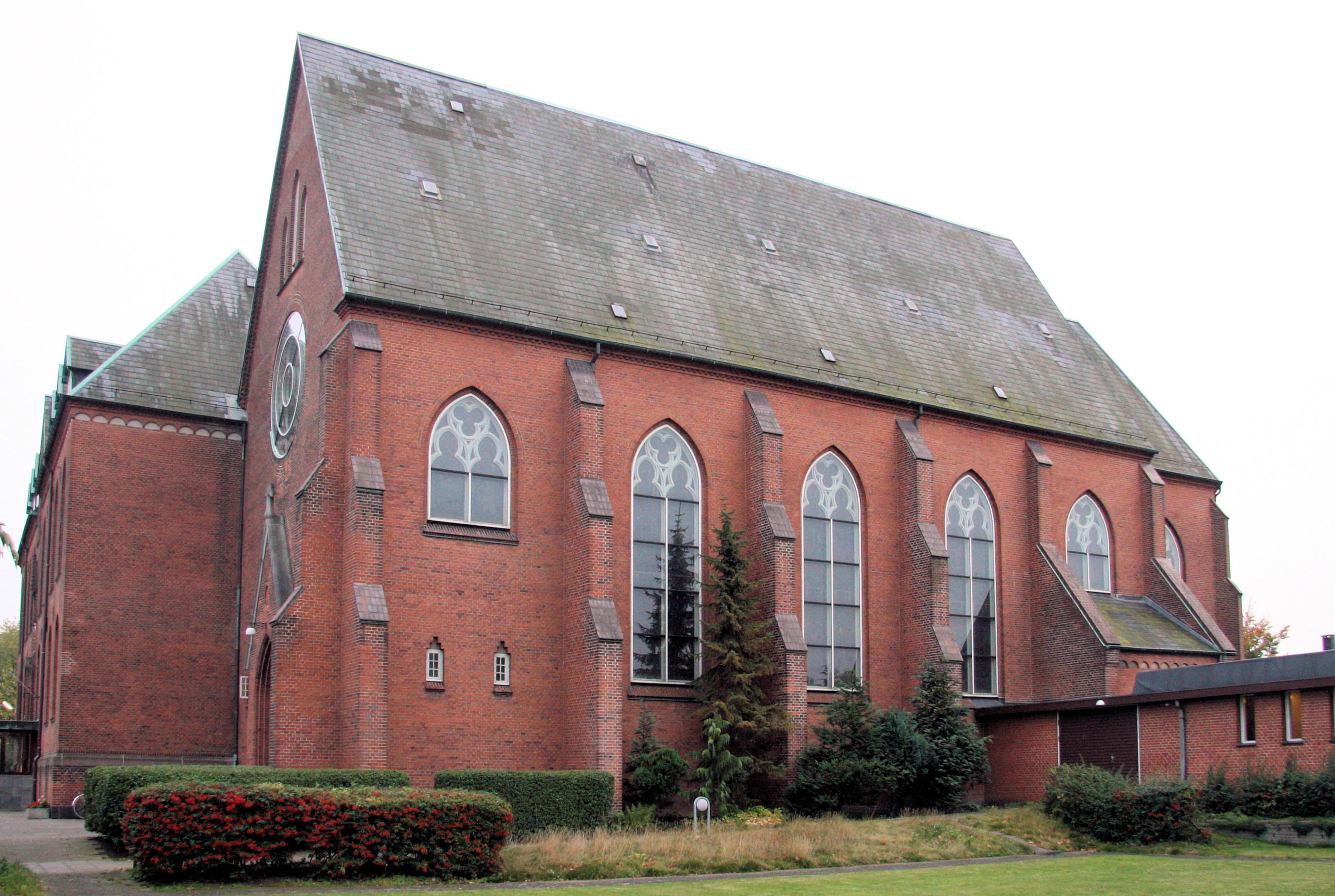 Immaculatakirken, Copenhagen, Denmark. Northside.